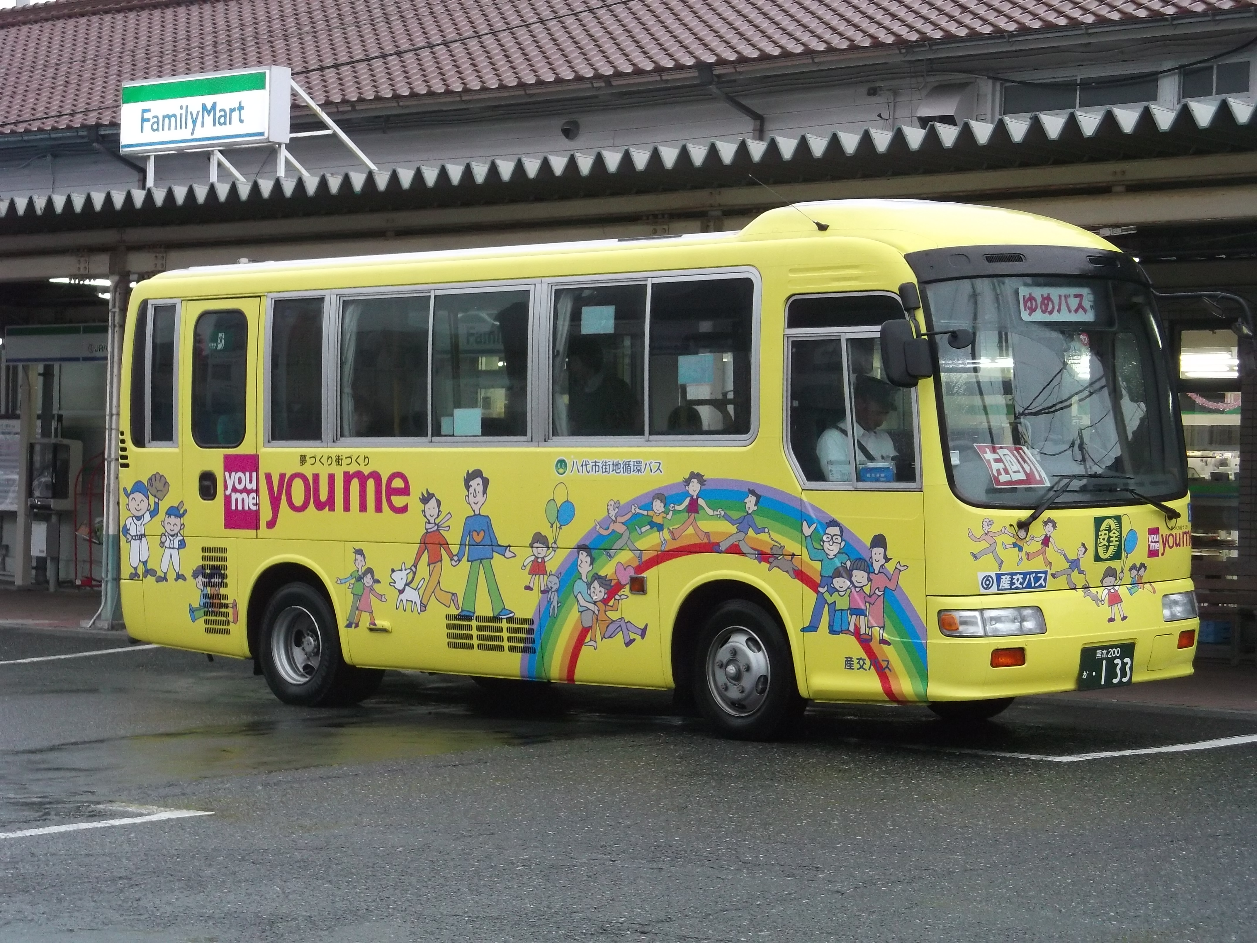 八代市街地循環バス ゆめバス